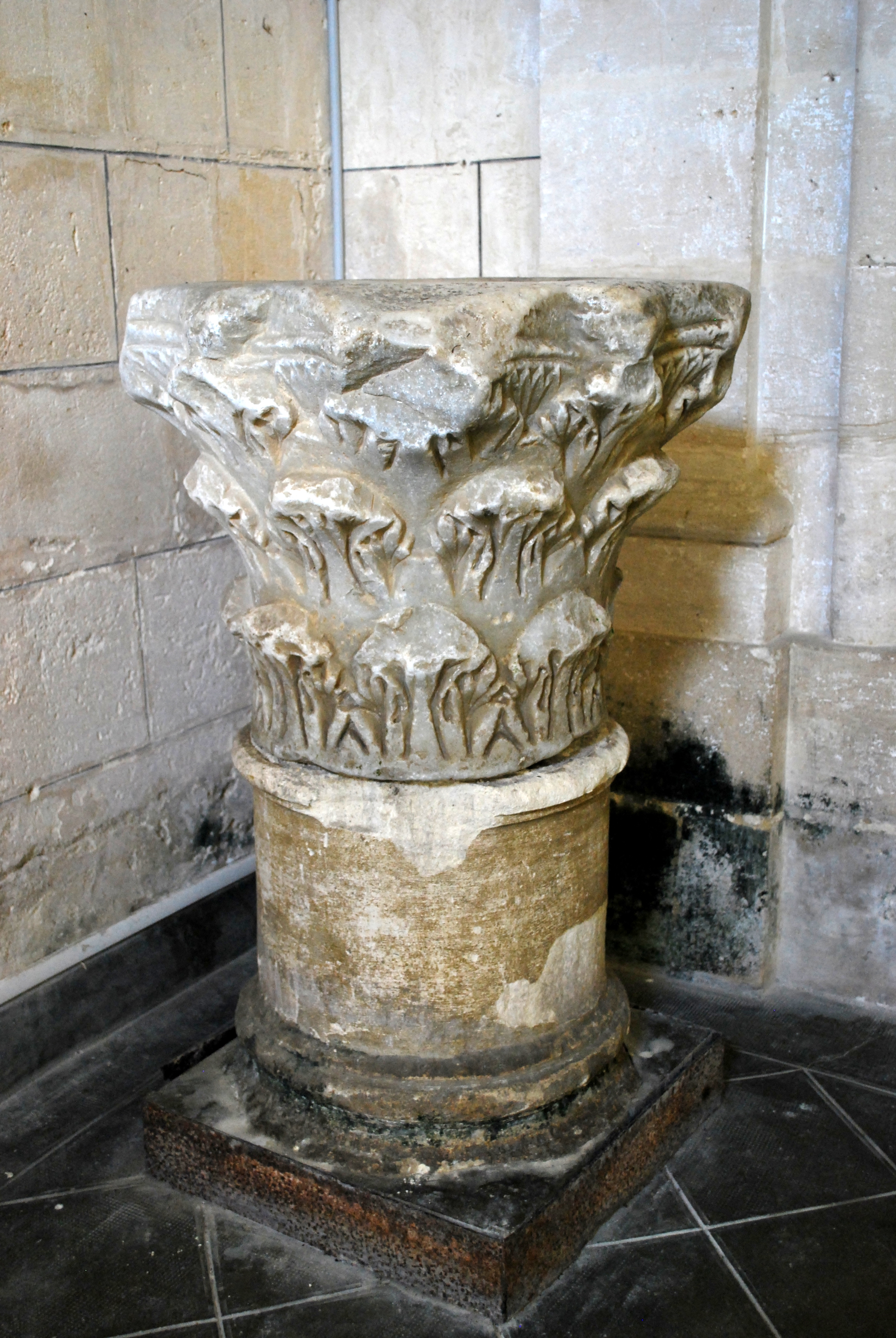 Fronsac église Saint-Martin Chapiteau choeur 1